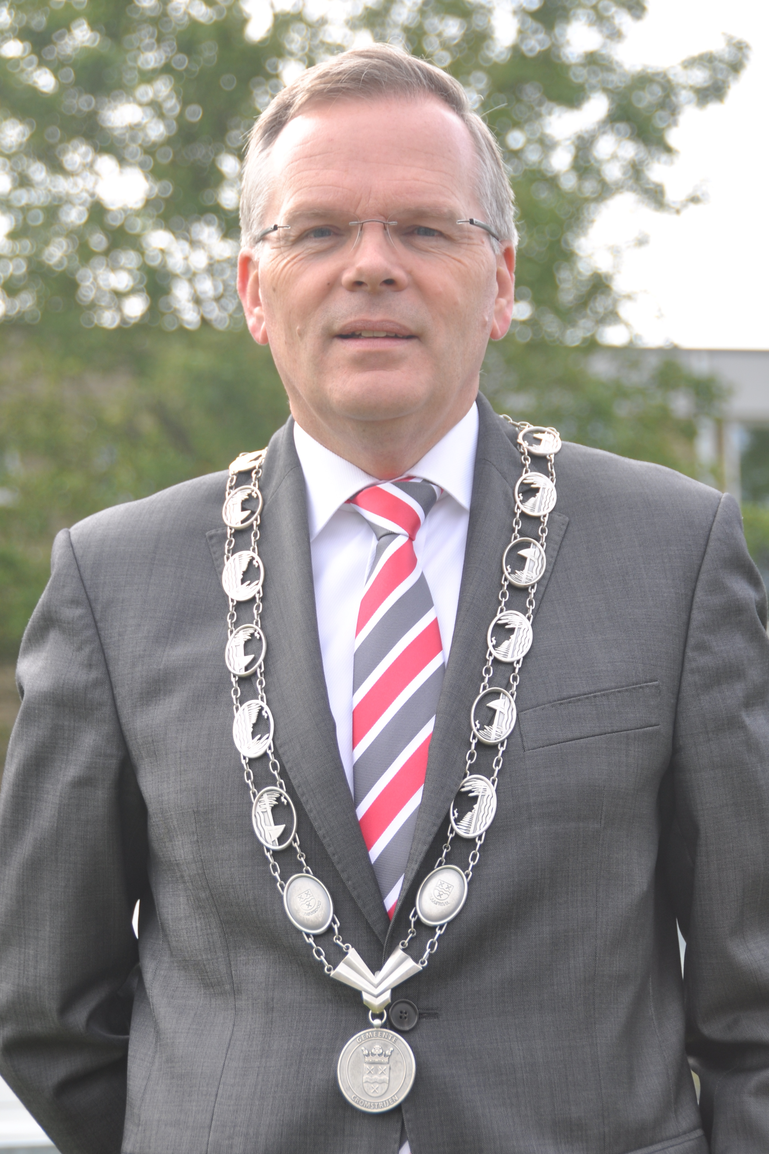 De heer J.J. (Jan) Luteijn, burgemeester van Cromstrijen.